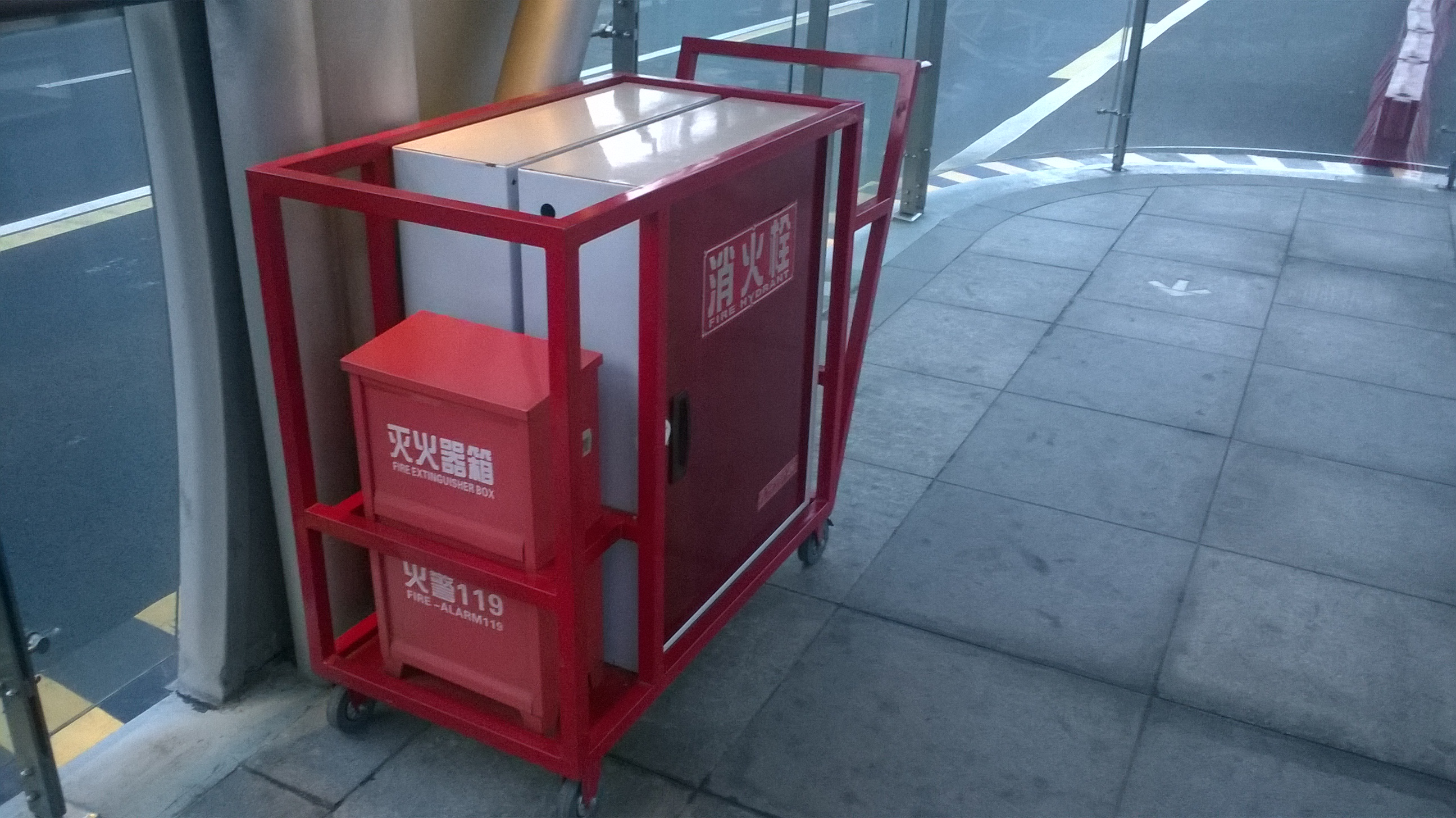 成都市二环路快速公交站台消防推车。